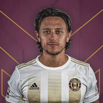 Danny Williams